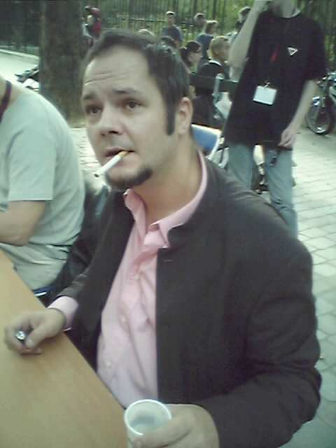 Patrice Killoffer au festival BD Delcourt à Bercy (Paris, France).